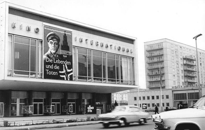 Berlin, Karl-Marx-Allee, Kino "International" Zentralbild Hochneder 7.11.64 Der sowjetische Film Die Lendenden und die Toten..läuft z.Zt. im Berliner Filtheater International (unser Bild) mit großem Erfolg.